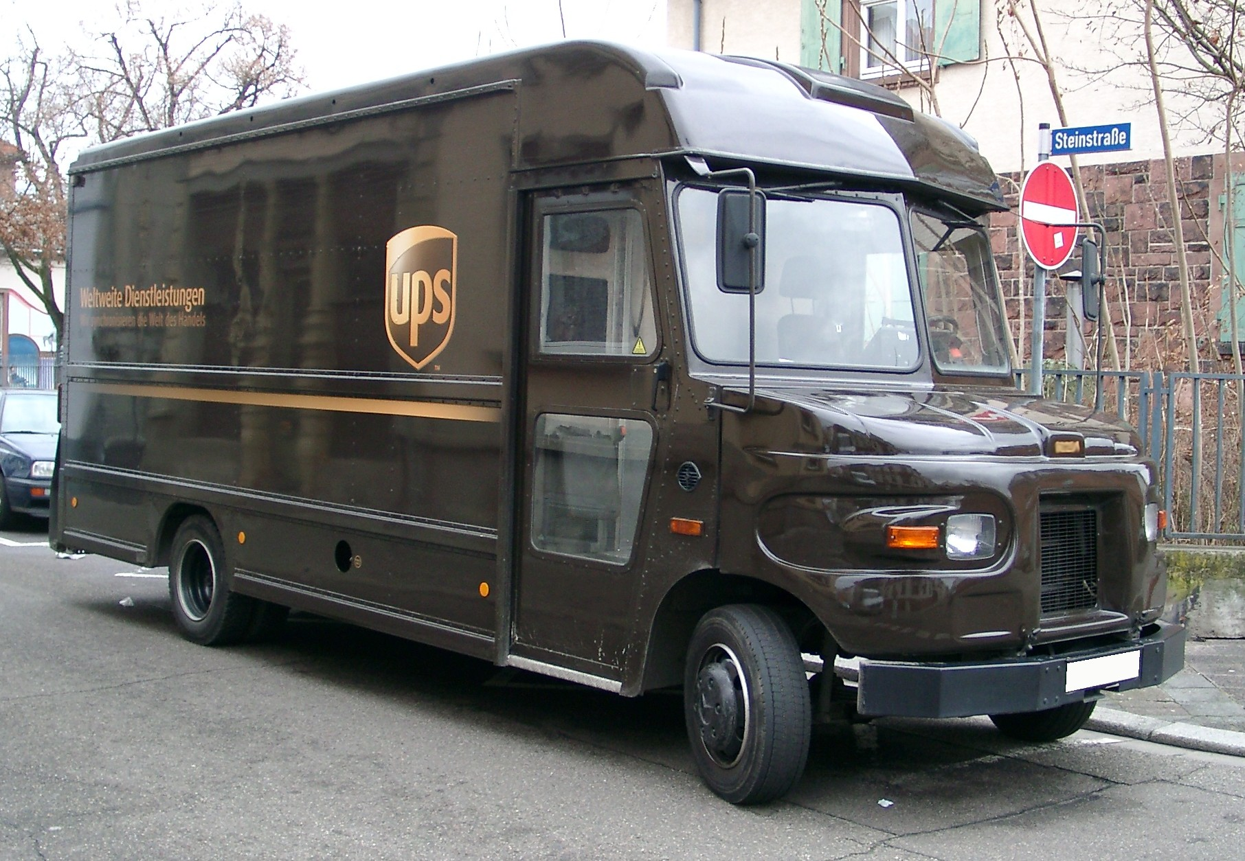 UPS-Truck